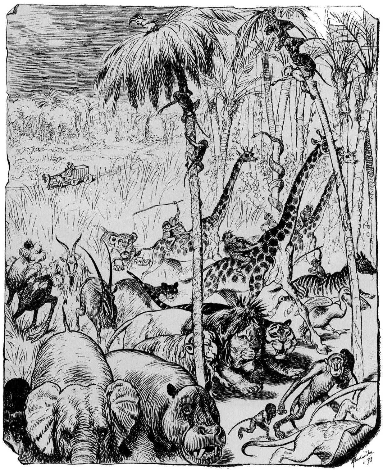 Adolf Oberländer: "Hagenbeck kommt."